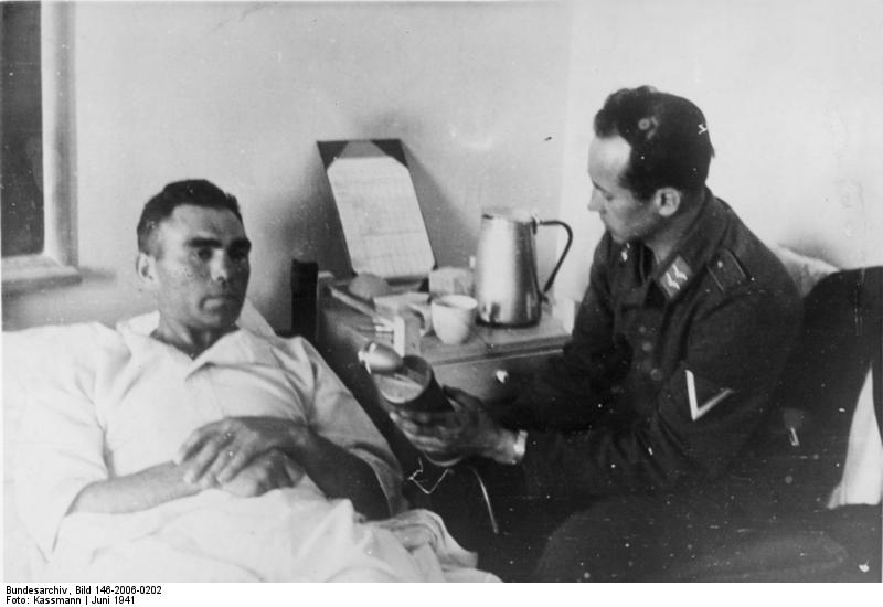 Max Schmeling im Lazarett Max Schmeling, der als Gefreiter in einem Fallschirmjägerregiment mit der ersten Welle der Fallschirmjägertruppe auf Kreta absprang, zog sich am dritten Tag seines Einsatzes eine Erkrankung zu und mußte ins Notlazarett gebracht werden. Durch eine Sanitäts-Ju wurde er nach Athen gebracht, wo er, den der englische Rundfunk bereits totgesagt hatte, in guter Pflege seiner baldigen Genesung entgegensieht. U.B.: Der Gefreite in einem Fallschrimjägerregiment und frühere Boxweltmeister Max Schmeling (links ) in einem Athener Lazarett. 3.6.41 PK: Kassmann-Weltbild